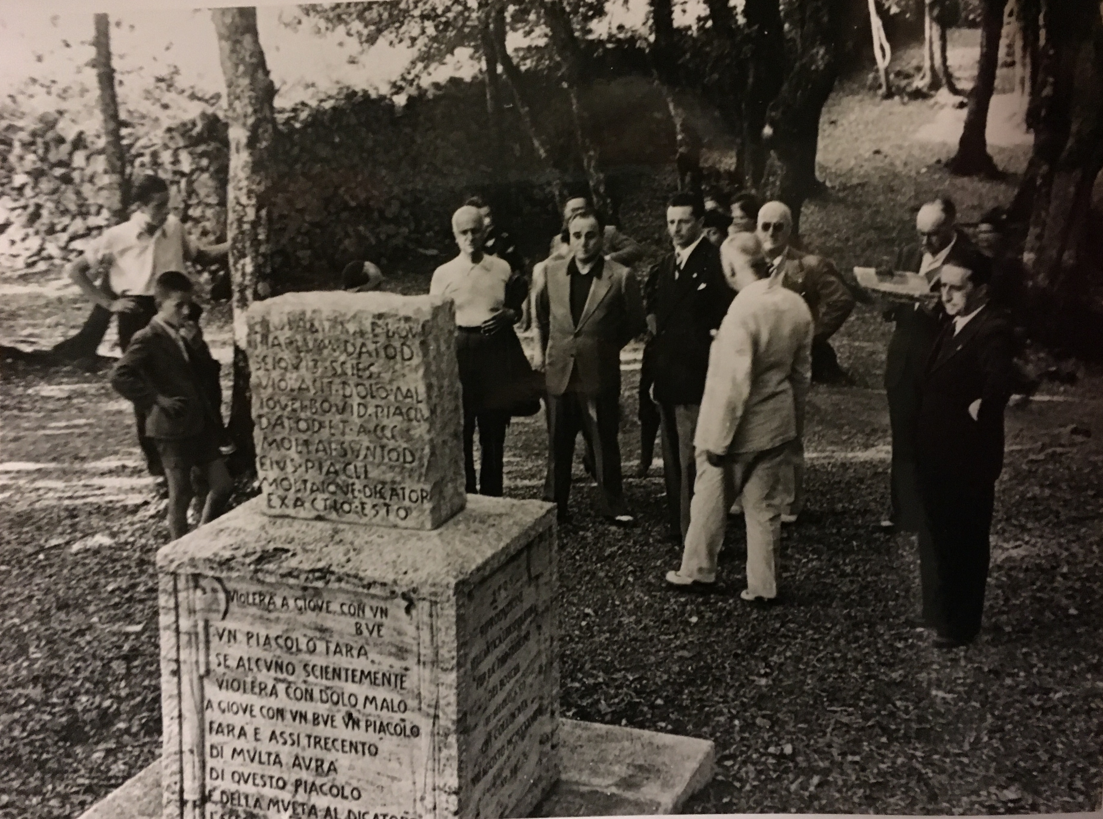 Monteluco. Beniamino Gigli davanti alla riproduzione della Lex spoletina. 1939